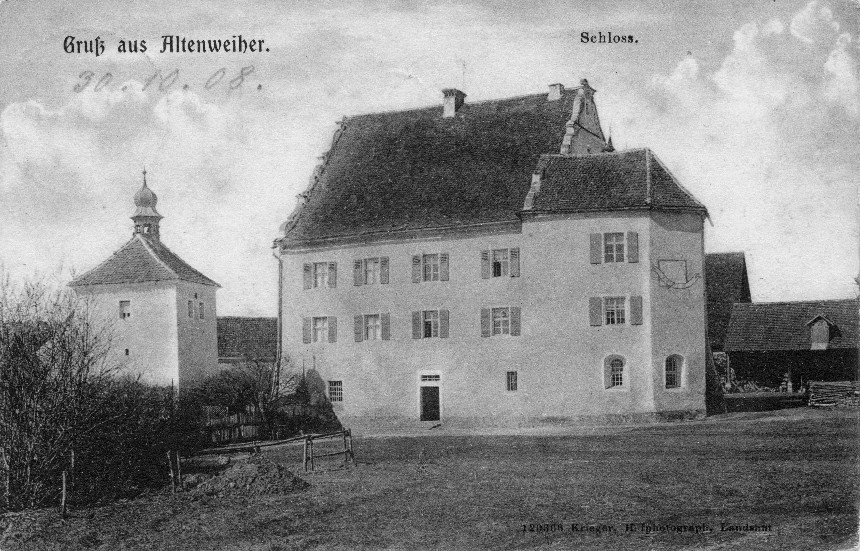 Das Hammerschloss Altenweiher mit der Schlosskapelle im Erdgeschoss im Anbau vorne rechts. Links der Glockenturm.